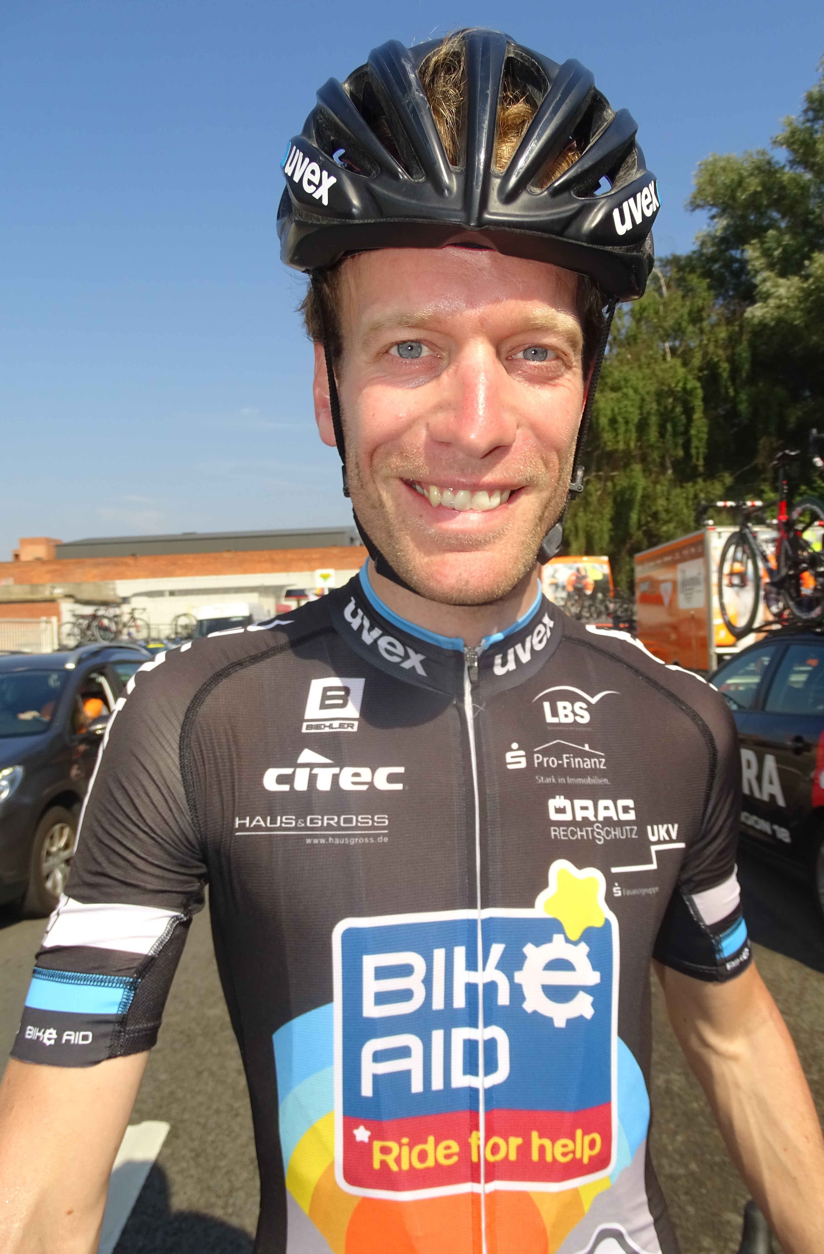 Reportage réalisé le dimanche 30 août à l'occasion du départ et de l'arrivée de la Coupe Sels 2015 à Merksem (Anvers), Belgique.